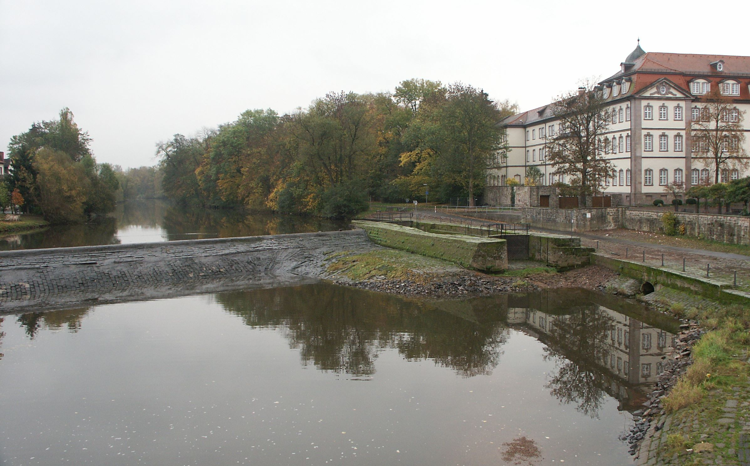 Die Fulda und die aus dem 16. Jahrhundert stammende Schleuse in Rotenburg, rechts das Schloss in Rotenburg